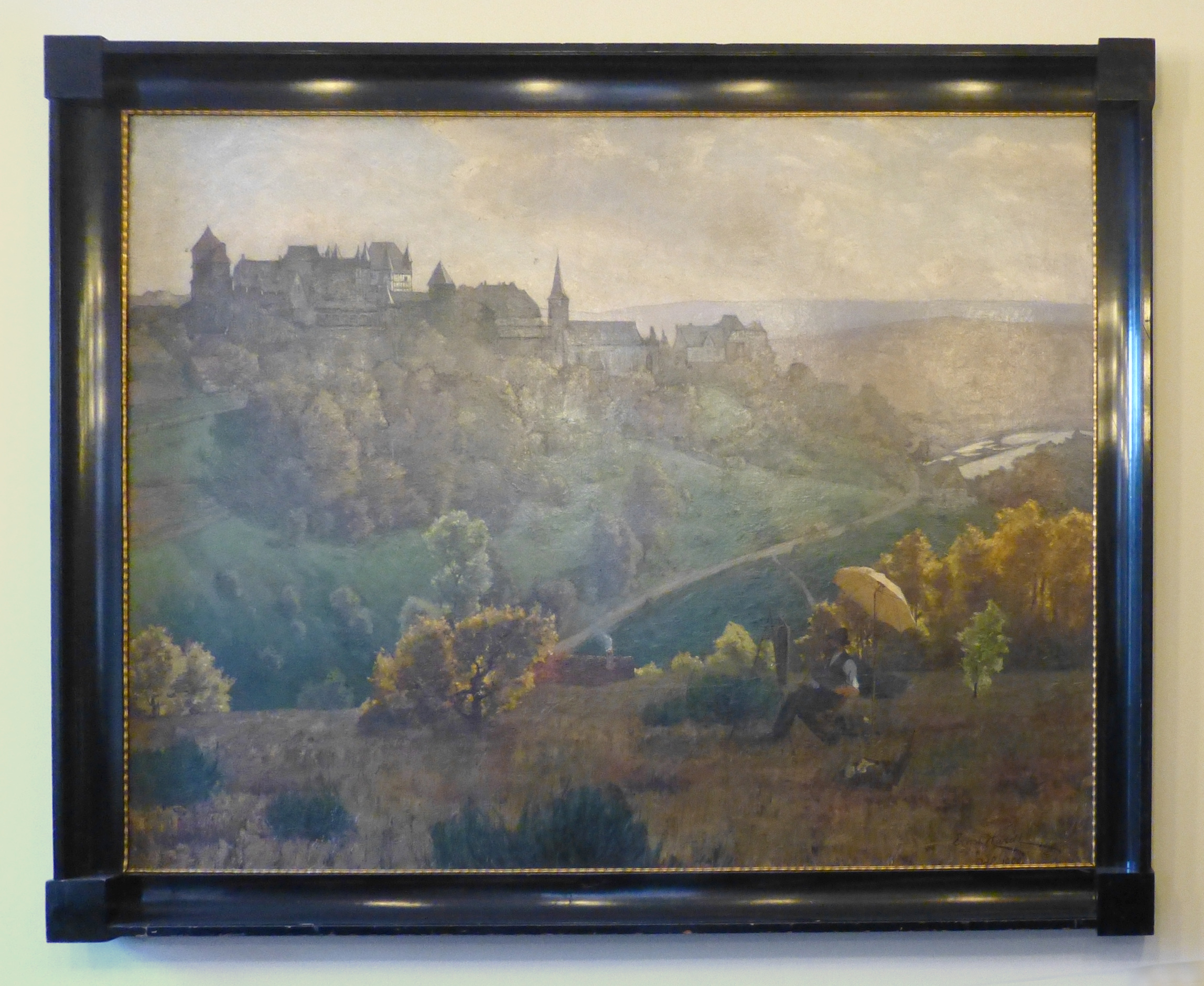 Gemälde von Ernst Hardt (1869-1917) im Rathaus Barmen, Wuppertal